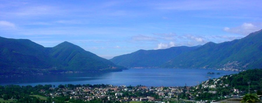 Lago Maggiore von Locarno Monti aus. Im Vordergrund Ascona.